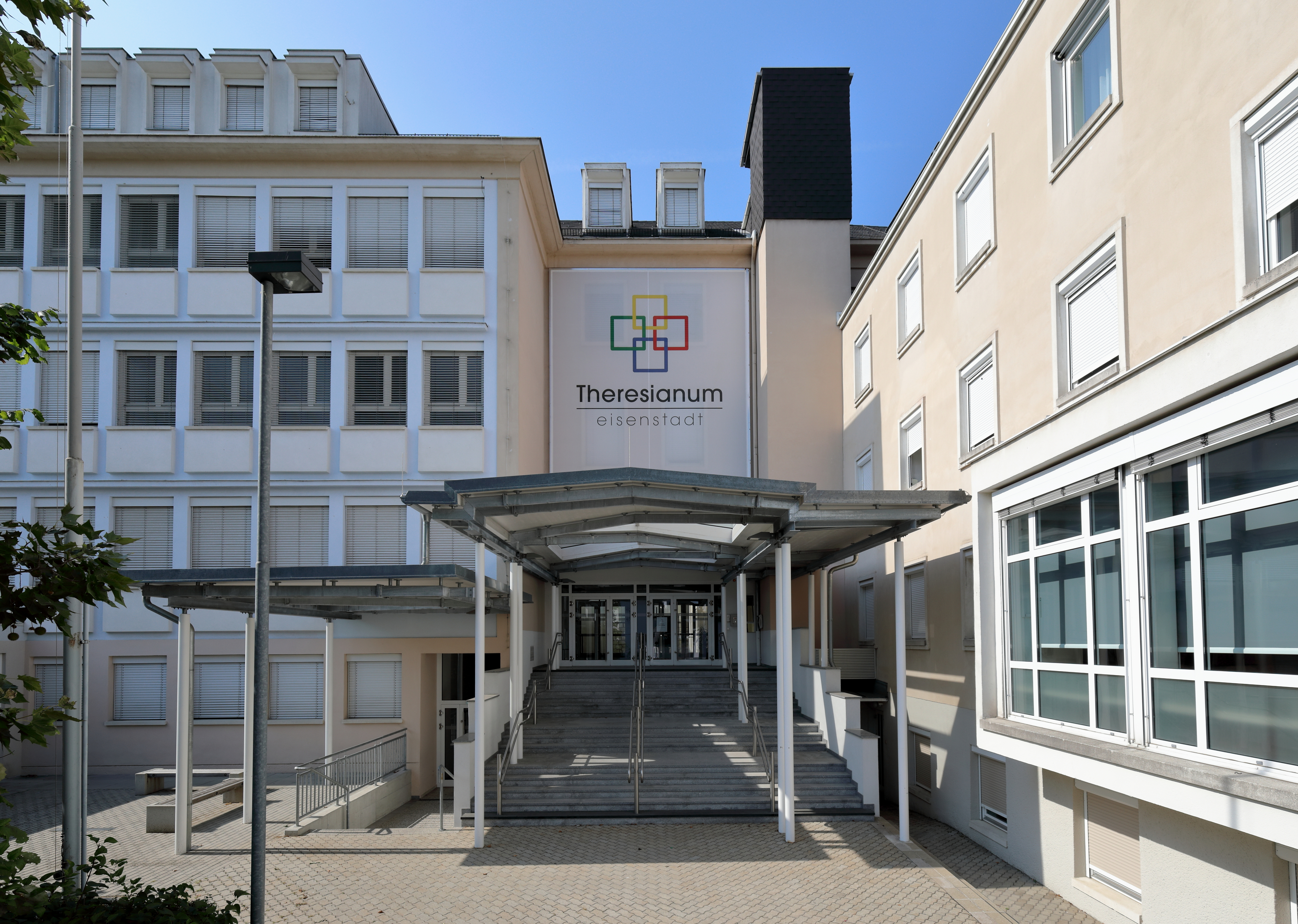 Hauptportal des Theresianum in der burgenländischen Hauptstadt Eisenstadt.Die Grundsteinlegung des Theresianum erfolgte im Jahr 1933. Nachdem bereit 1954 ein Erweiterung stattfand, wurde 1958 mit einem großen Erweiterungsbau begonnen (Pläne von Architekt Robert Kramreiter), der 1962 mit der Kapellenweihe und 1963 mit der Schul- und Hausweihe (Klostertrakt) abgeschlossen wurde. Weiter großen Zu- und Umbauten erfolgten ab 1987 und 2009 wurde südseitig für 4 Klassenzimmer angebaut.